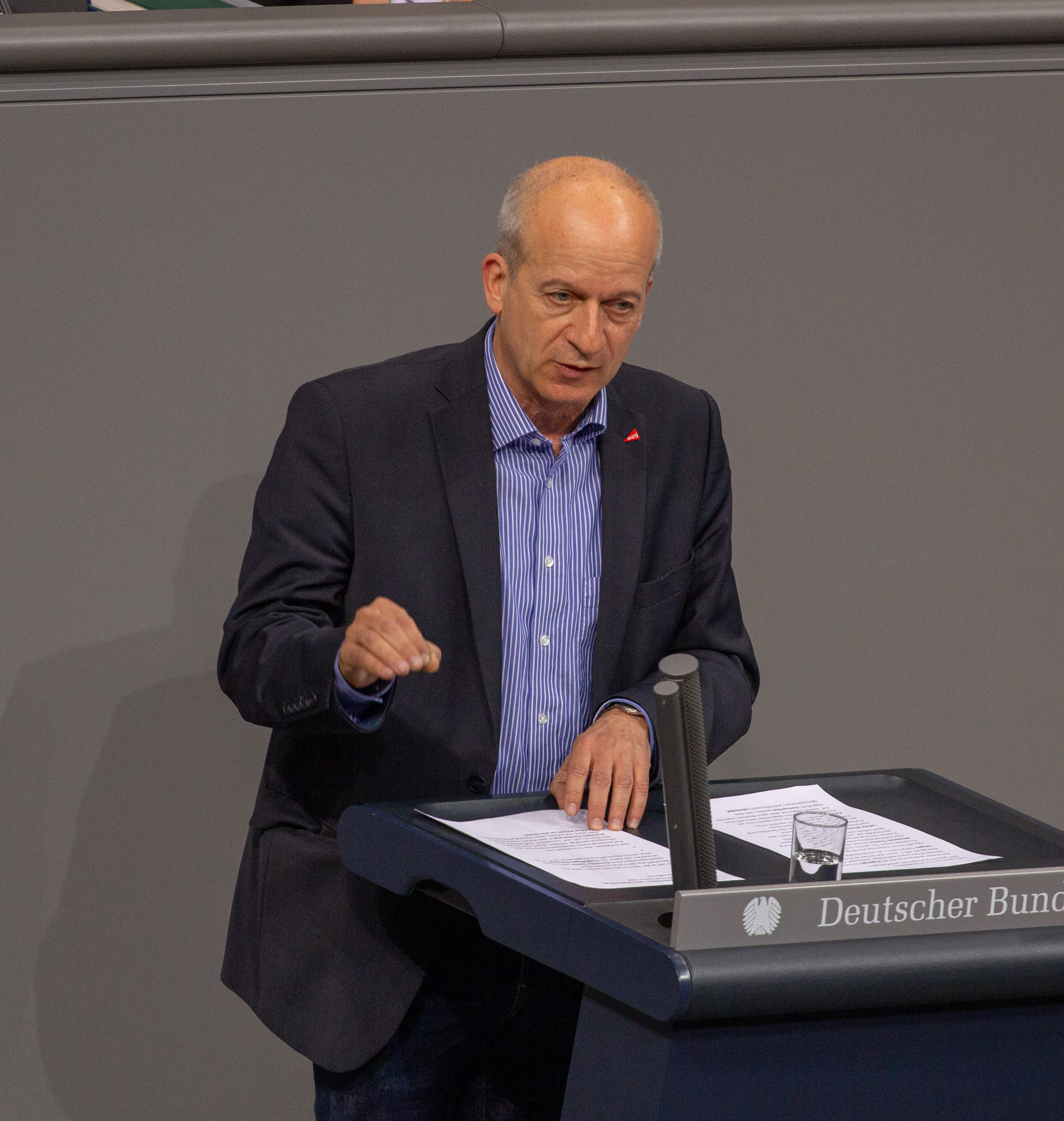 Friedrich Straetmanns, Mitglied des Deutschen Bundestages, während einer Plenarsitzung am 11. April 2019 in Berlin.